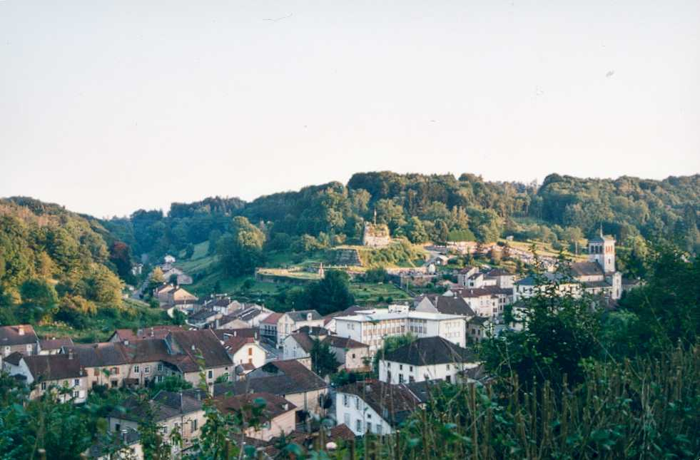 vue générale de Fontenoy-le-Château